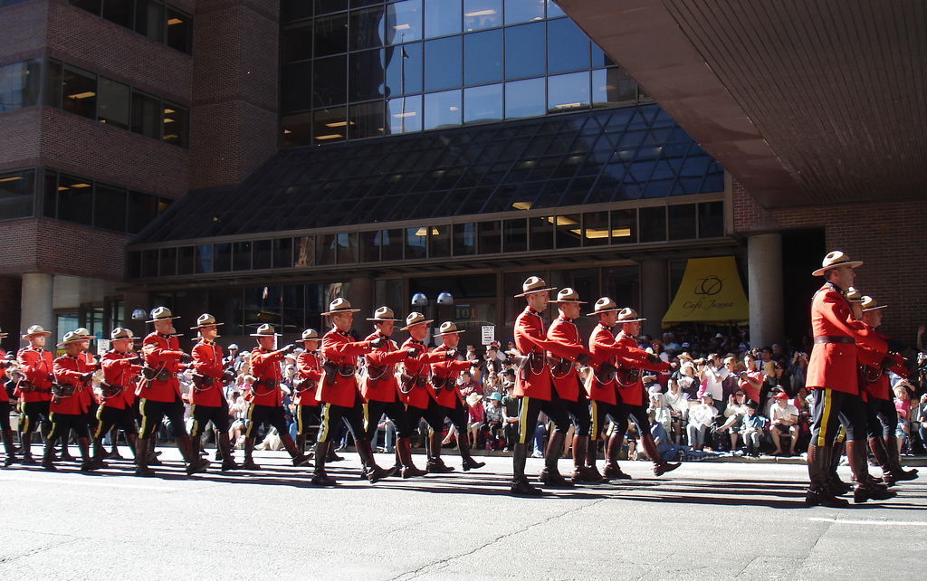 Calgary Stampede Parade 2011